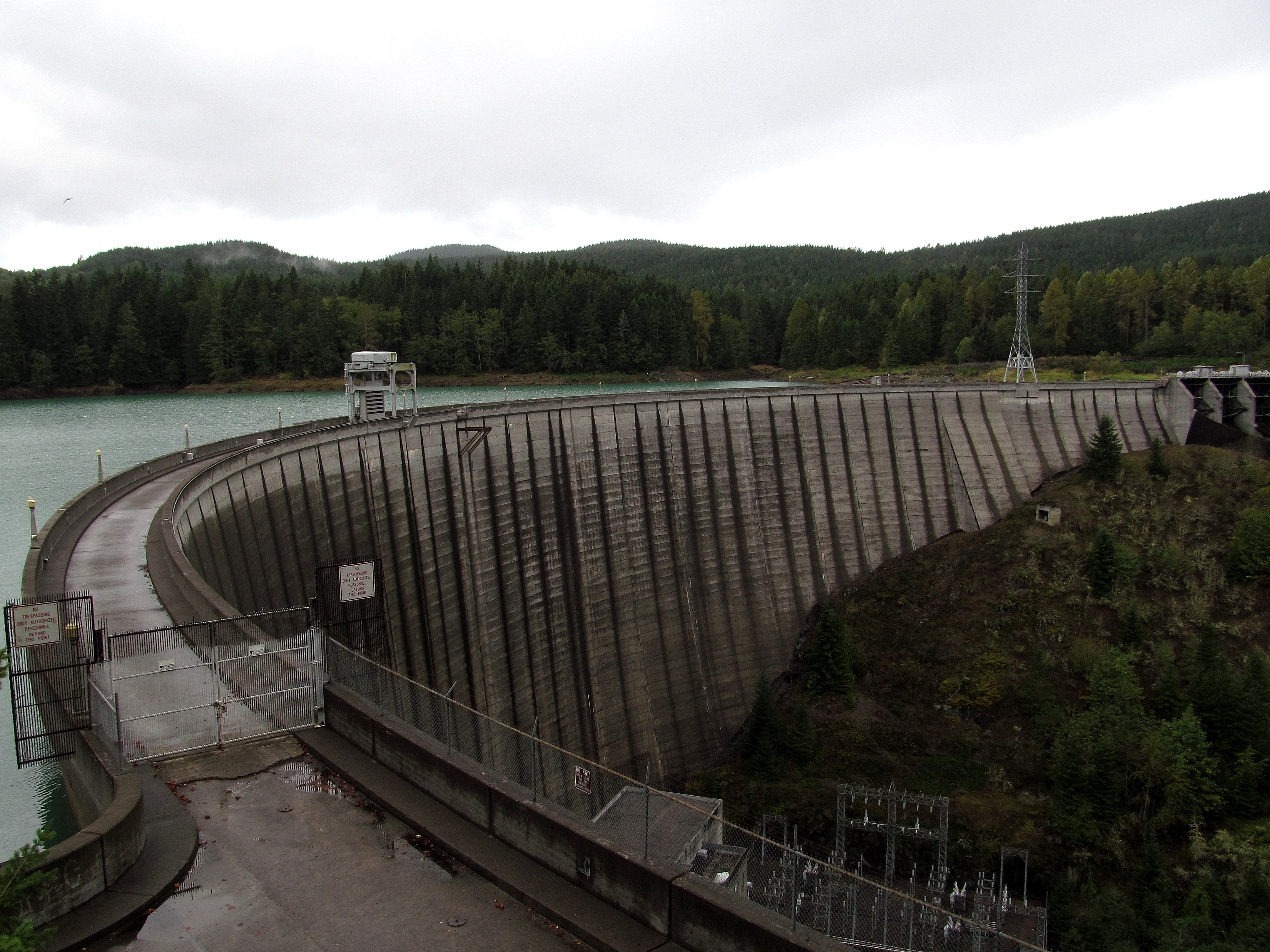 alder dam